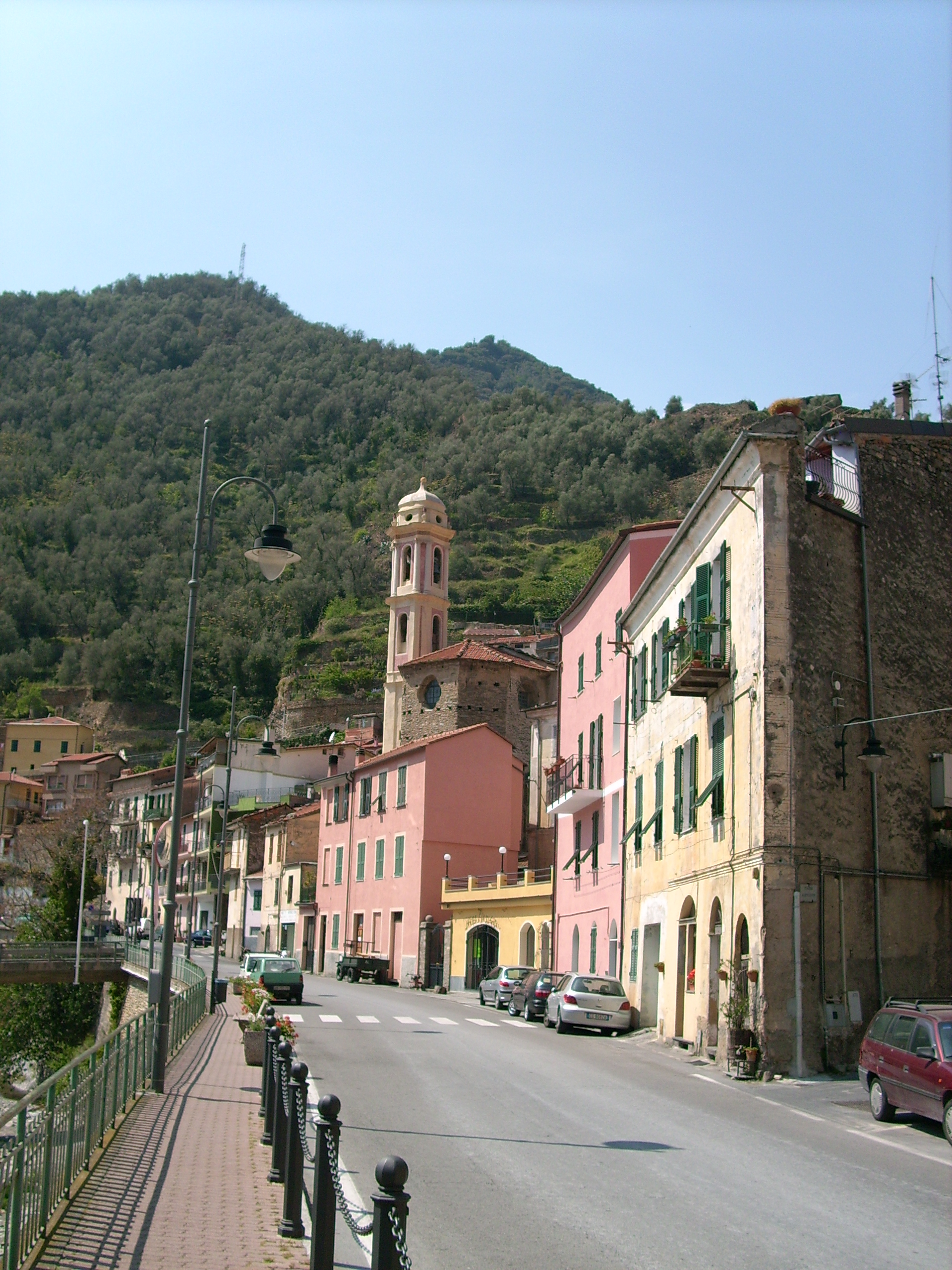 Badalucco, Liguria, Italia